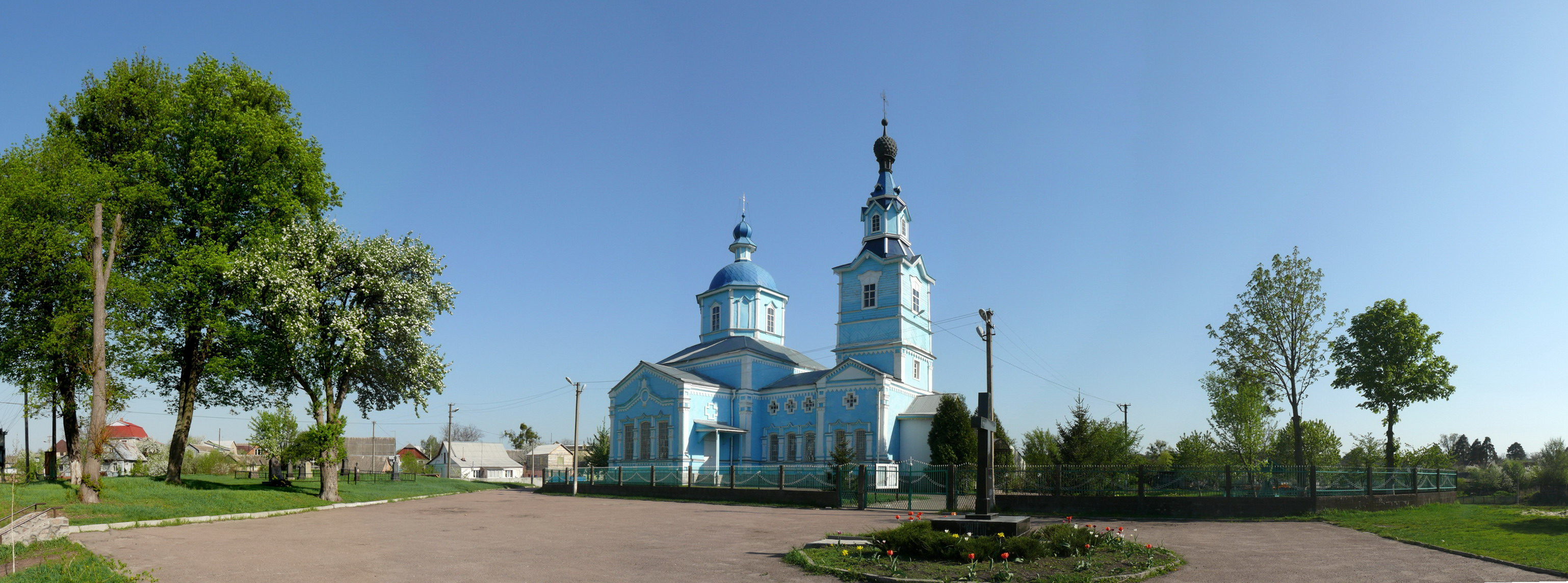 Прицерковная площадь Свято-Михайловского храма